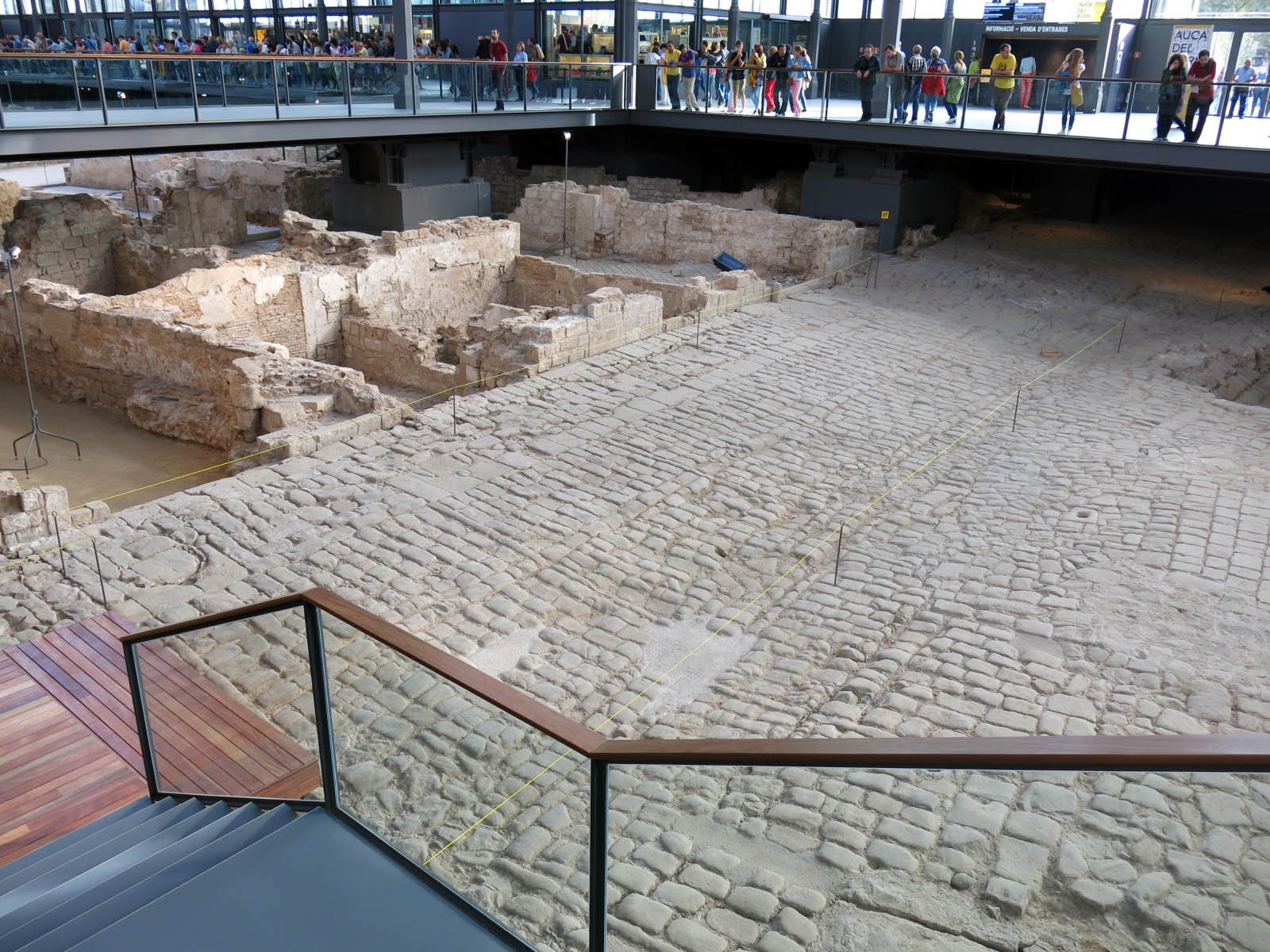 Mercat del Born (Barcelona). Pla del Bornet amb la Casa Sans (N.25) -espai de terra amb un llum- i la Casa Colomer (N.24) -següents tres blocs- Object location41° 23′ 08.76″ N, 2° 11′ 01.54″ E